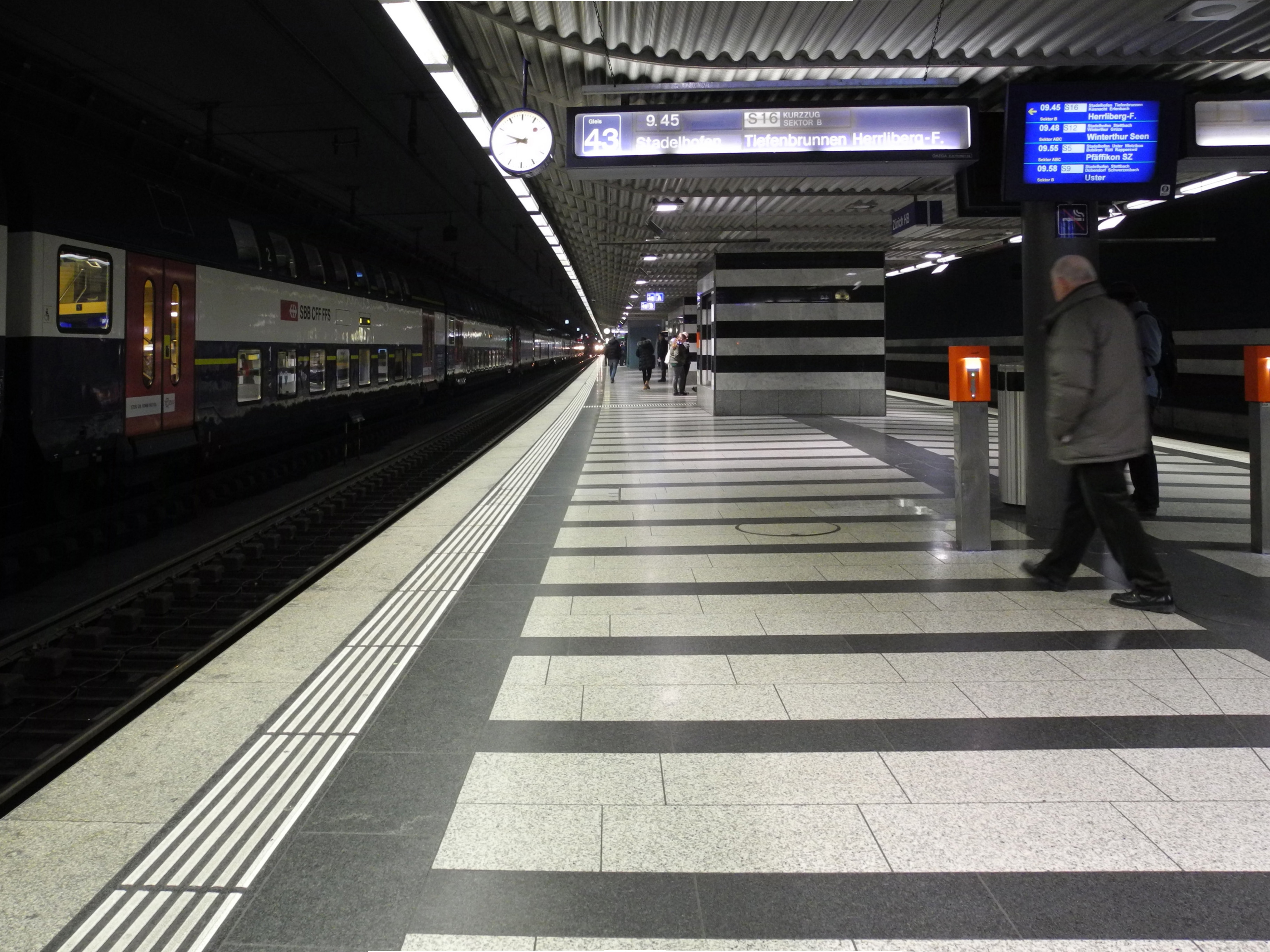 S-Bahn Perron